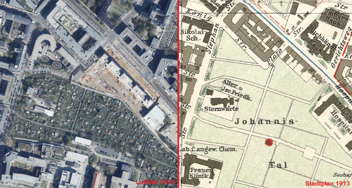 Lage des ersten jüdischen Friedhofs in Leipzig: Vergleich eines Luftbilds von 2019 mit einem Stadtplan von 1913